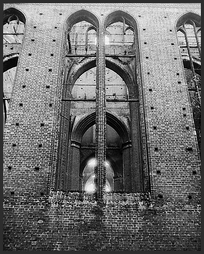 Ruine der Georgenkirche in Wismar in den 1980er Jahren